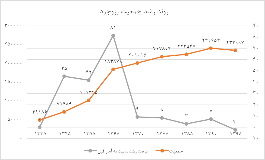 تغییرات جمعیت و درصد رشد در هر دوره